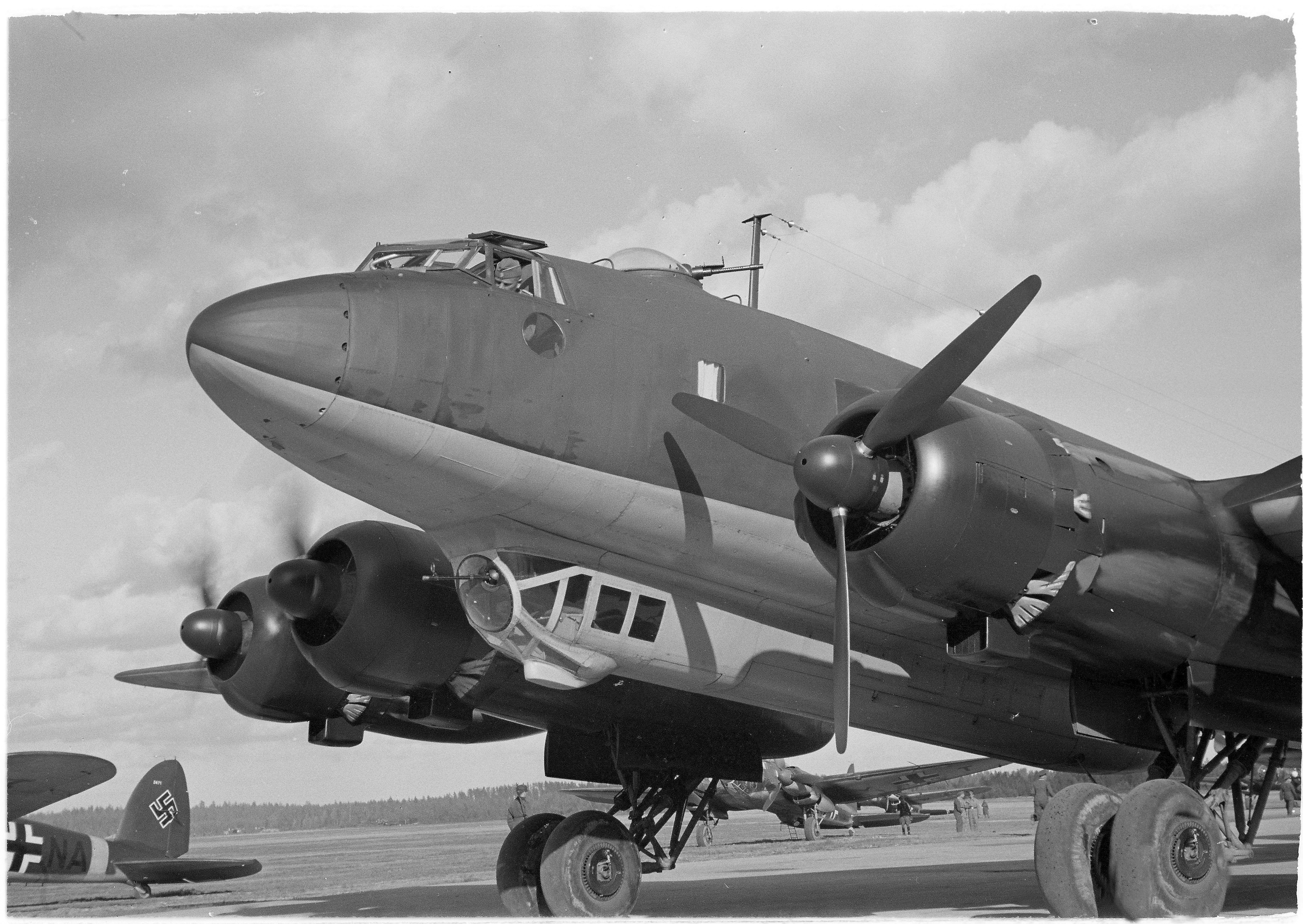 Adolf Hitlerin vierailu marsalkka Mannerheimin 75-vuotissyntymäpäivillä. (Kuvassa on Focke-Wulf Fw 200C-3/U9). Kuvauspaikka: Immolan lentokenttä